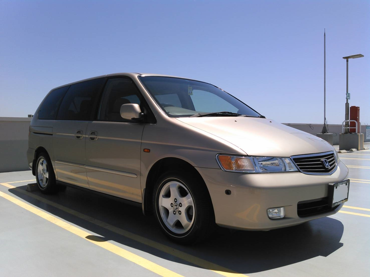 メサベージュメタリック フロントサイドビューカメラ装着車